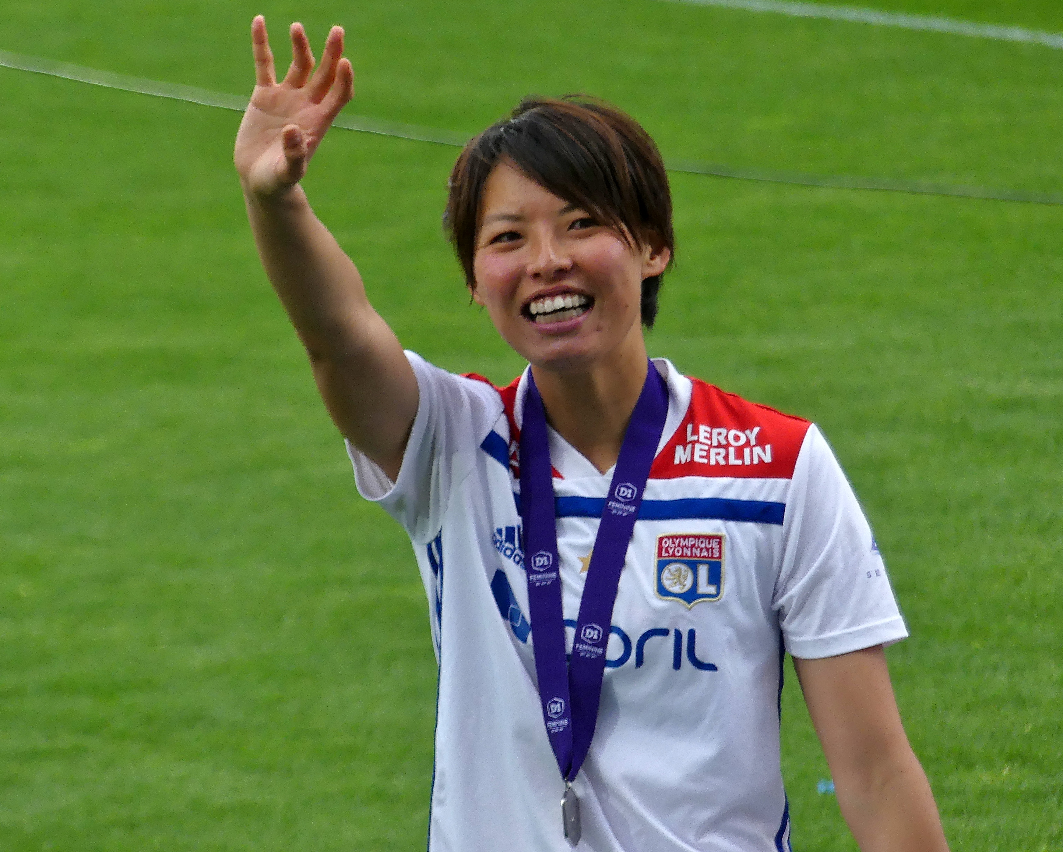 Saki Kumagai (熊谷紗希) célébrant son sixième titre en championnat de France le 4 mai 2019.